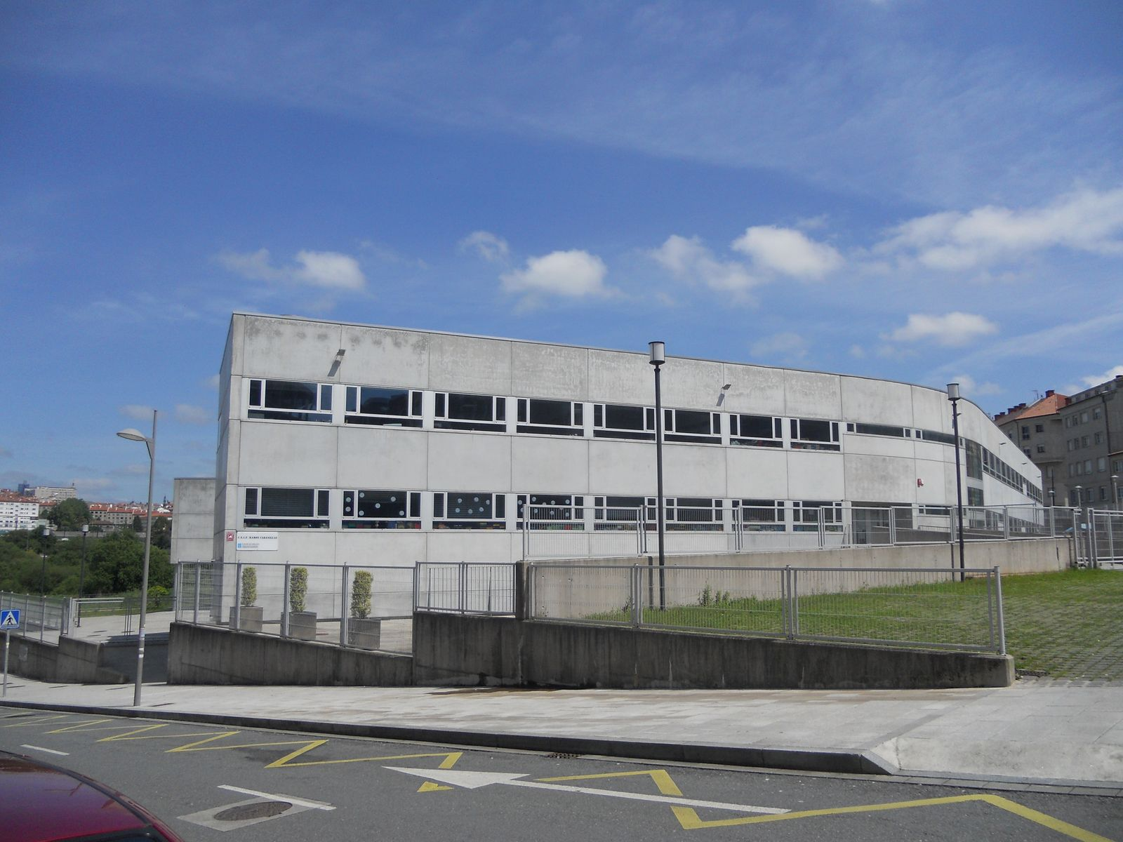 Exterior do CEIP Ramón Cabanillas en Santiago de Compostela ano 2015.